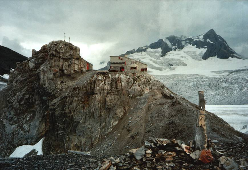 Blick zur Planurahütte in den Glarner Alpen